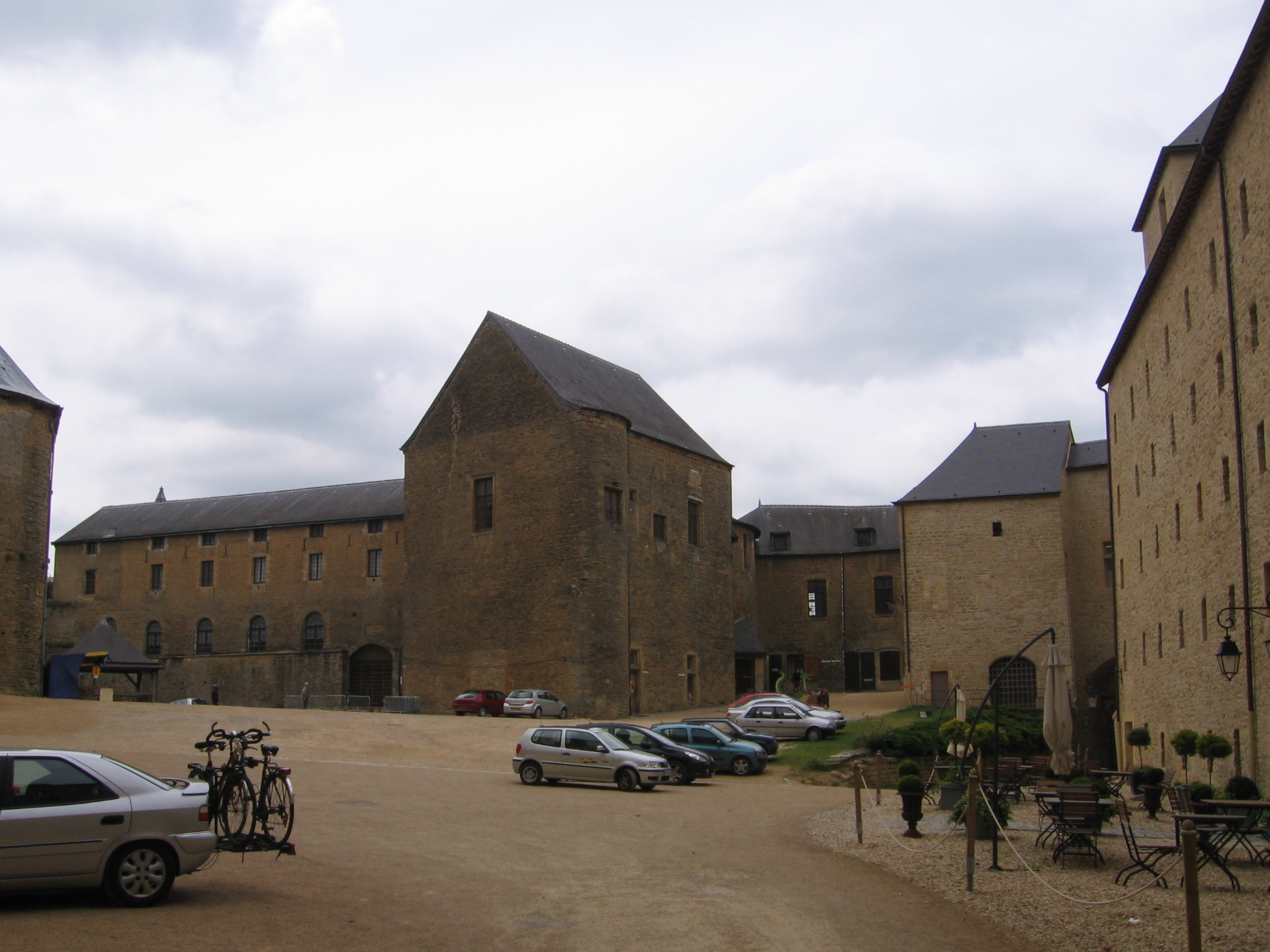 Sedan